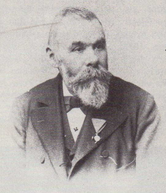 Portrait meines UrUrgroßvaters